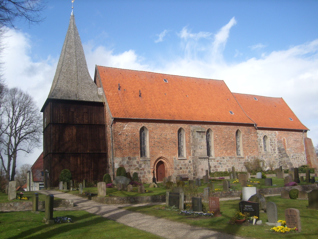 Dorfkirche Maria Magdalena in Mustin, Kreis Herzogtum Lauenburg